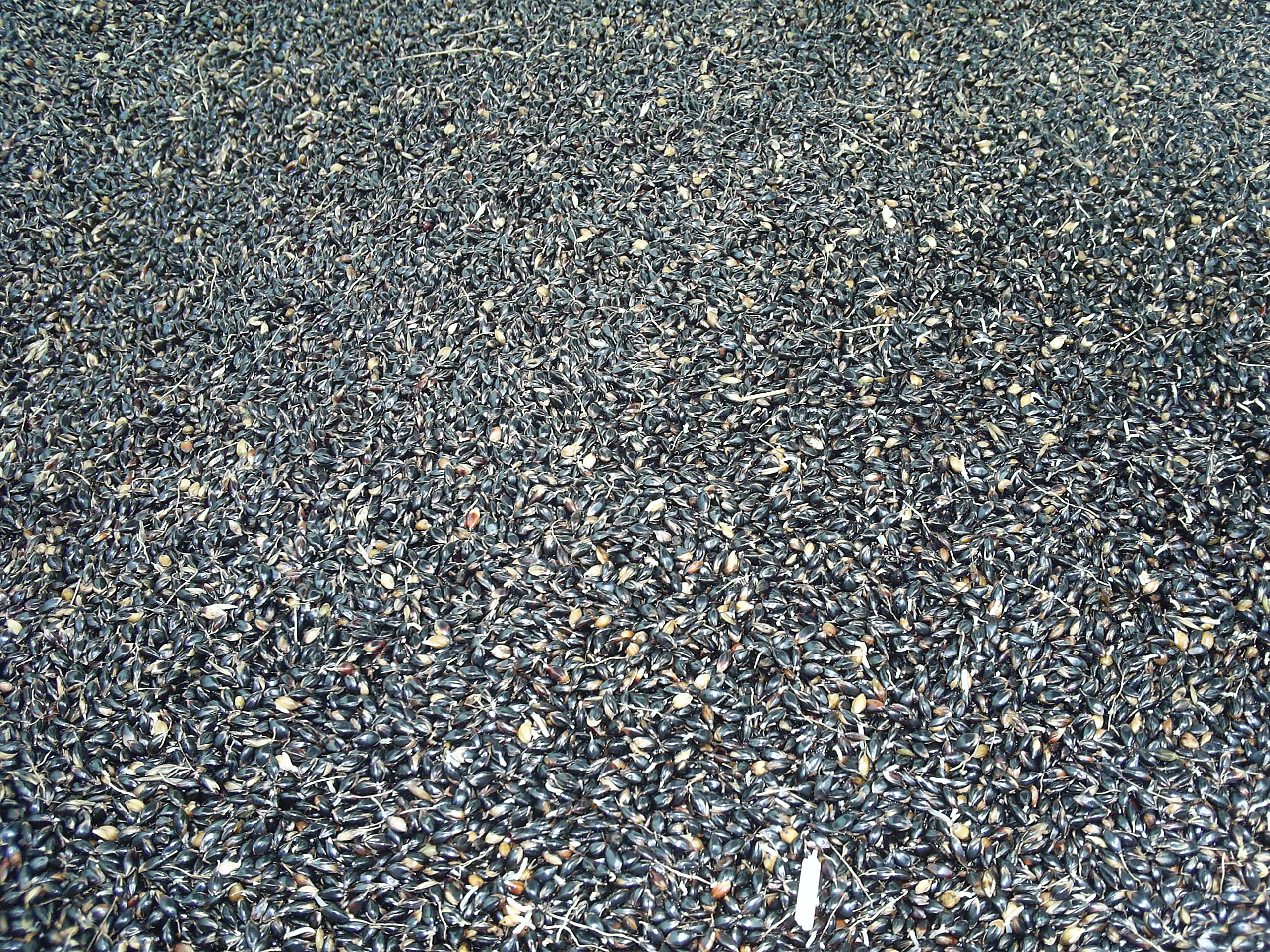 Semilla de sorgo negro forrajero (Sorghum almum).